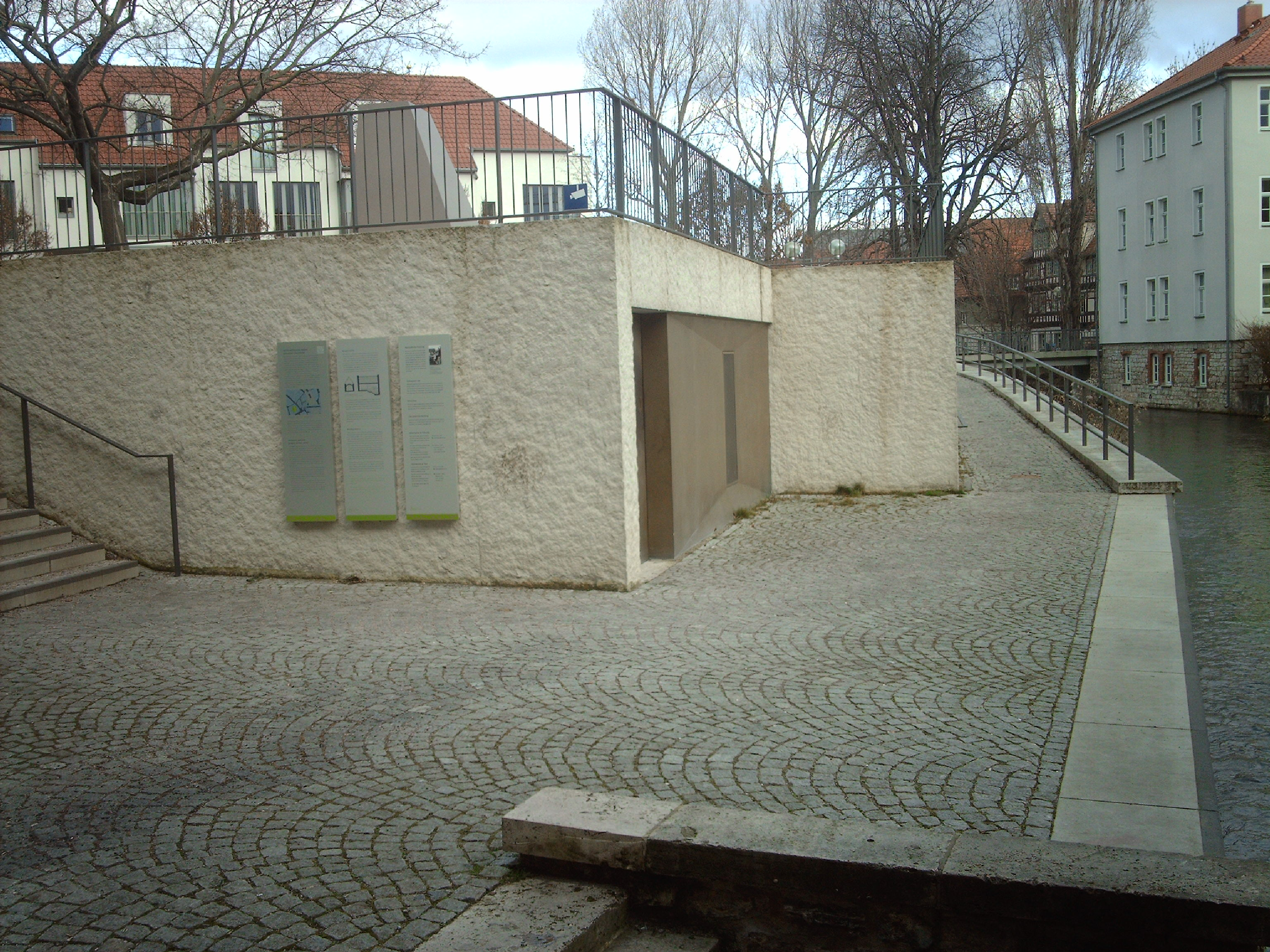 Eingang zur ehemaligen mittelalterlichen Mikwe in Erfurt.